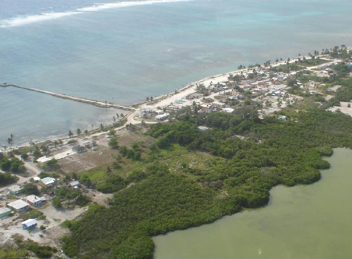 Imagen de Xacalak, Quintana Roo, México